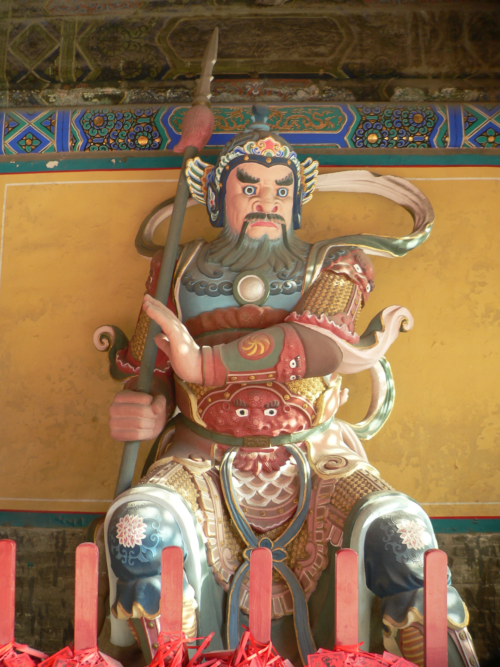 哼哈二将之一